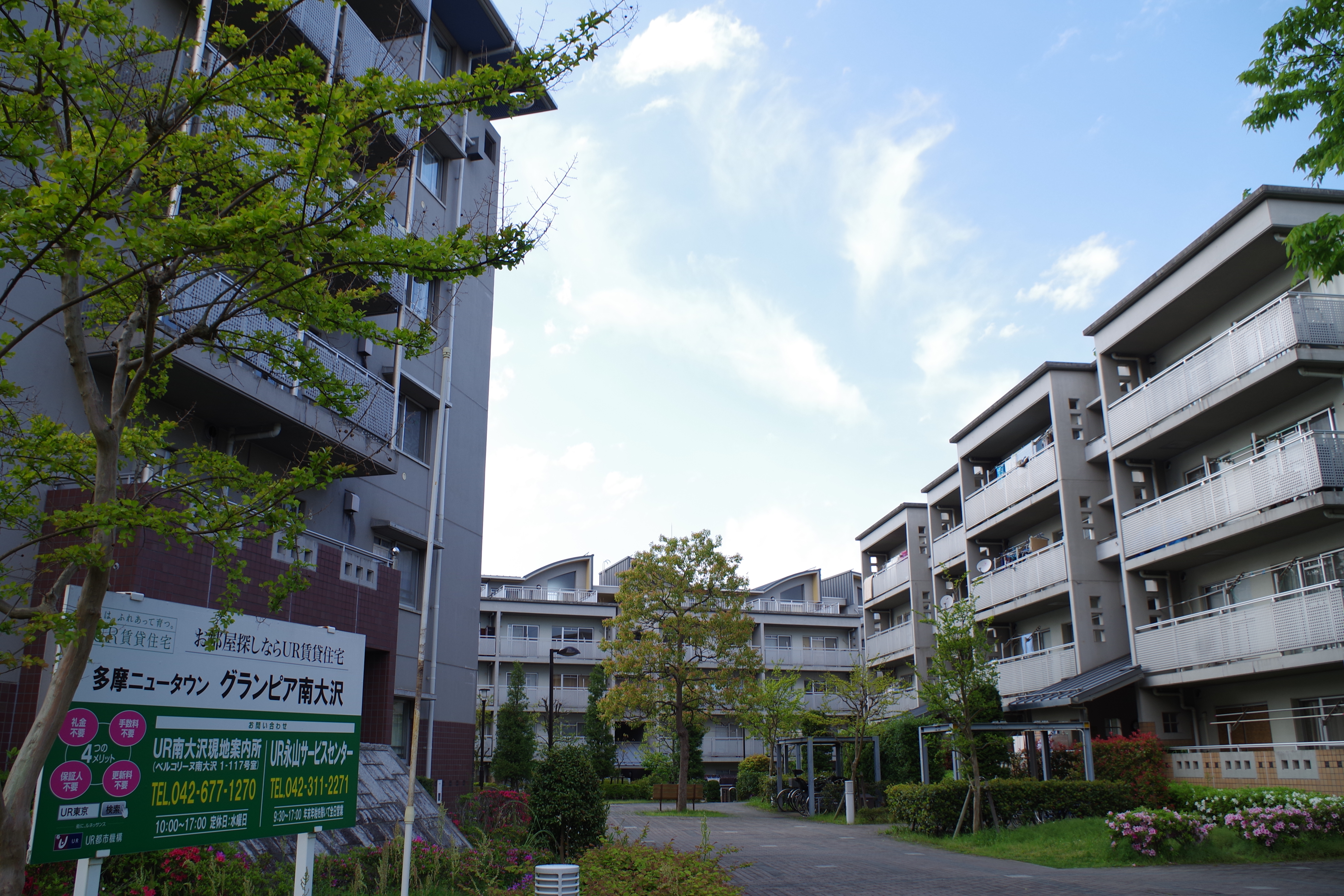 多摩ニュータウングランピア南大沢団地（2016/04/30撮影）